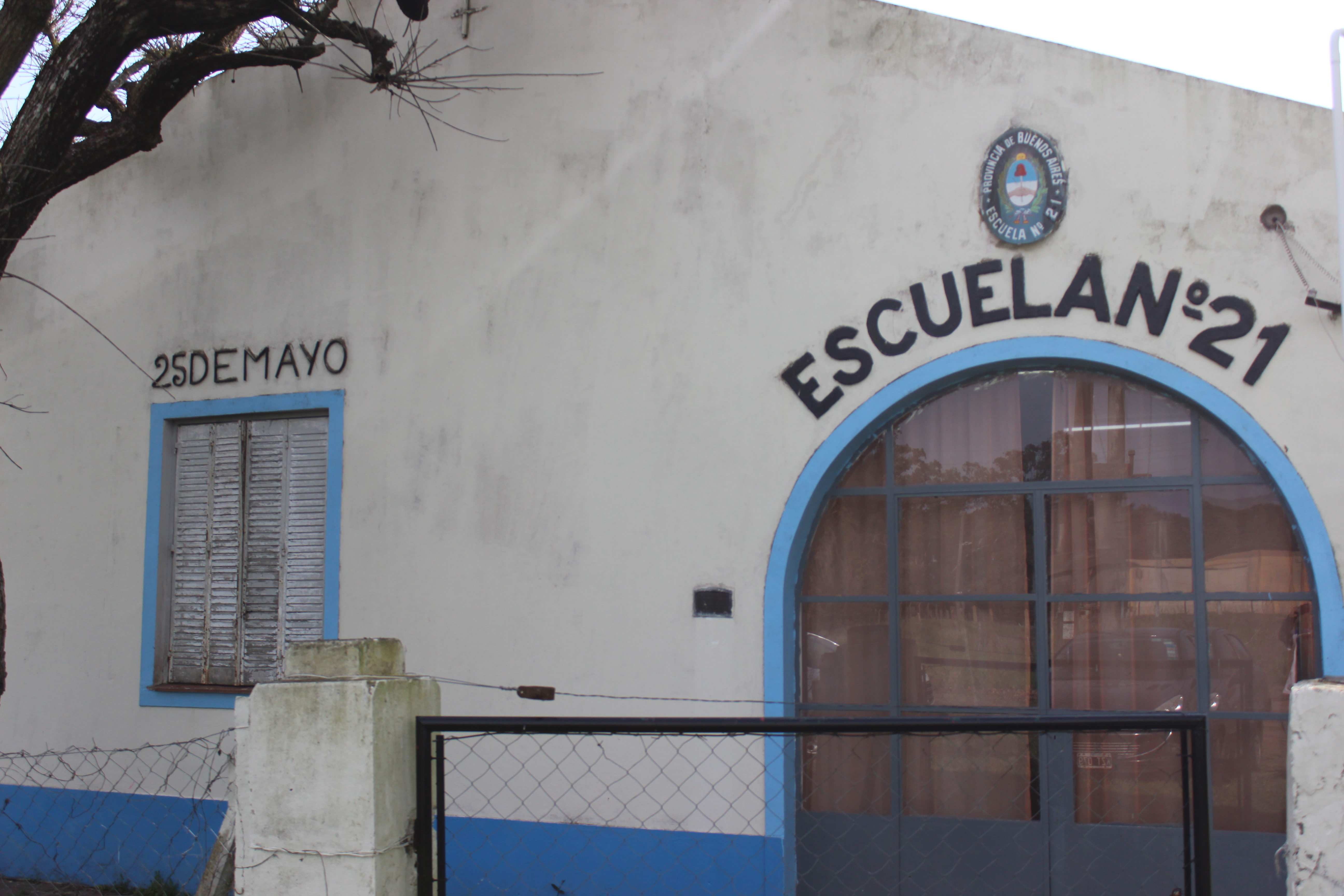 ep 21